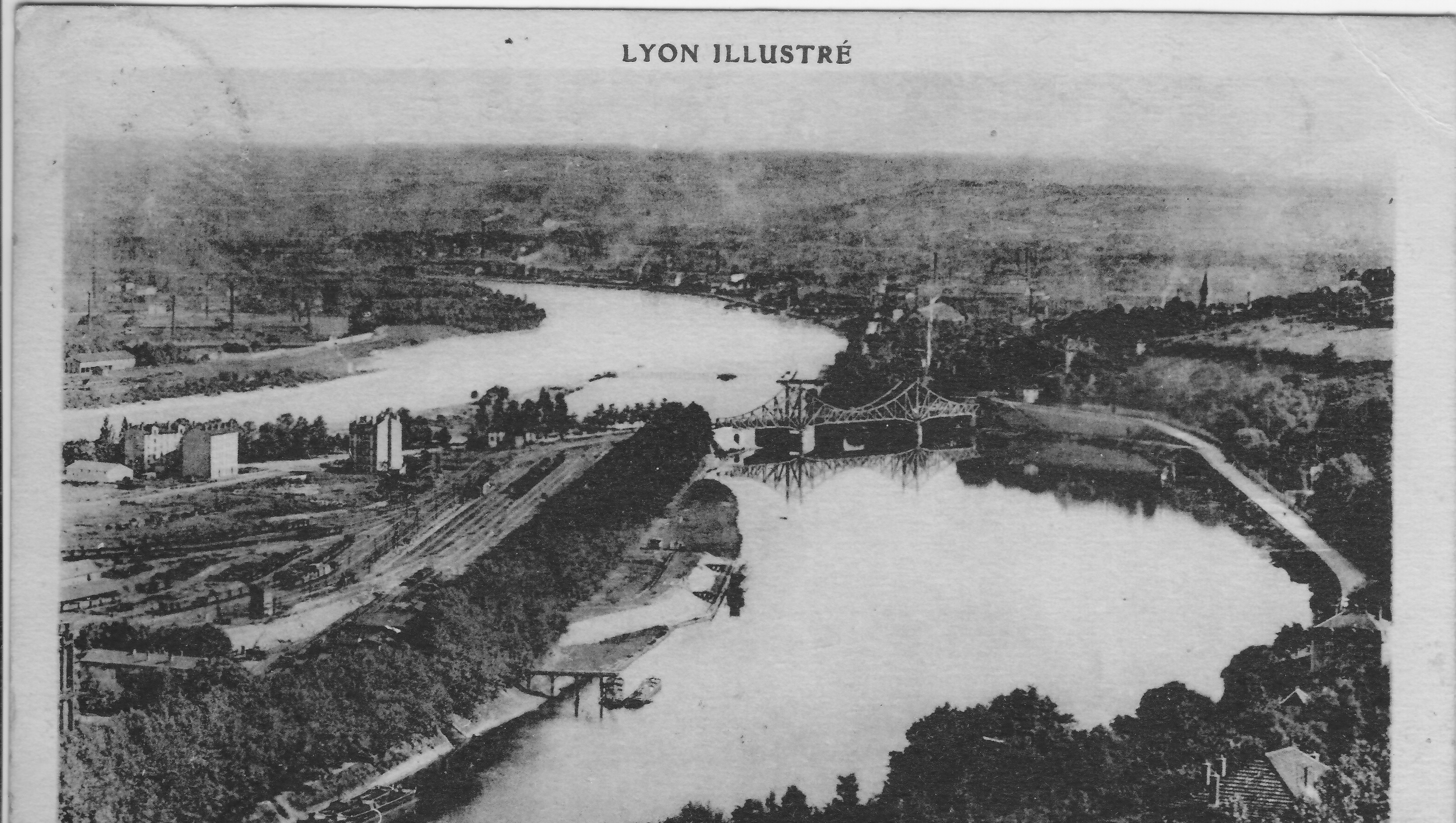 Vue du sud de la presqu'île de Lyon, du pont de la Mulatière, du Rhône et de la Saône